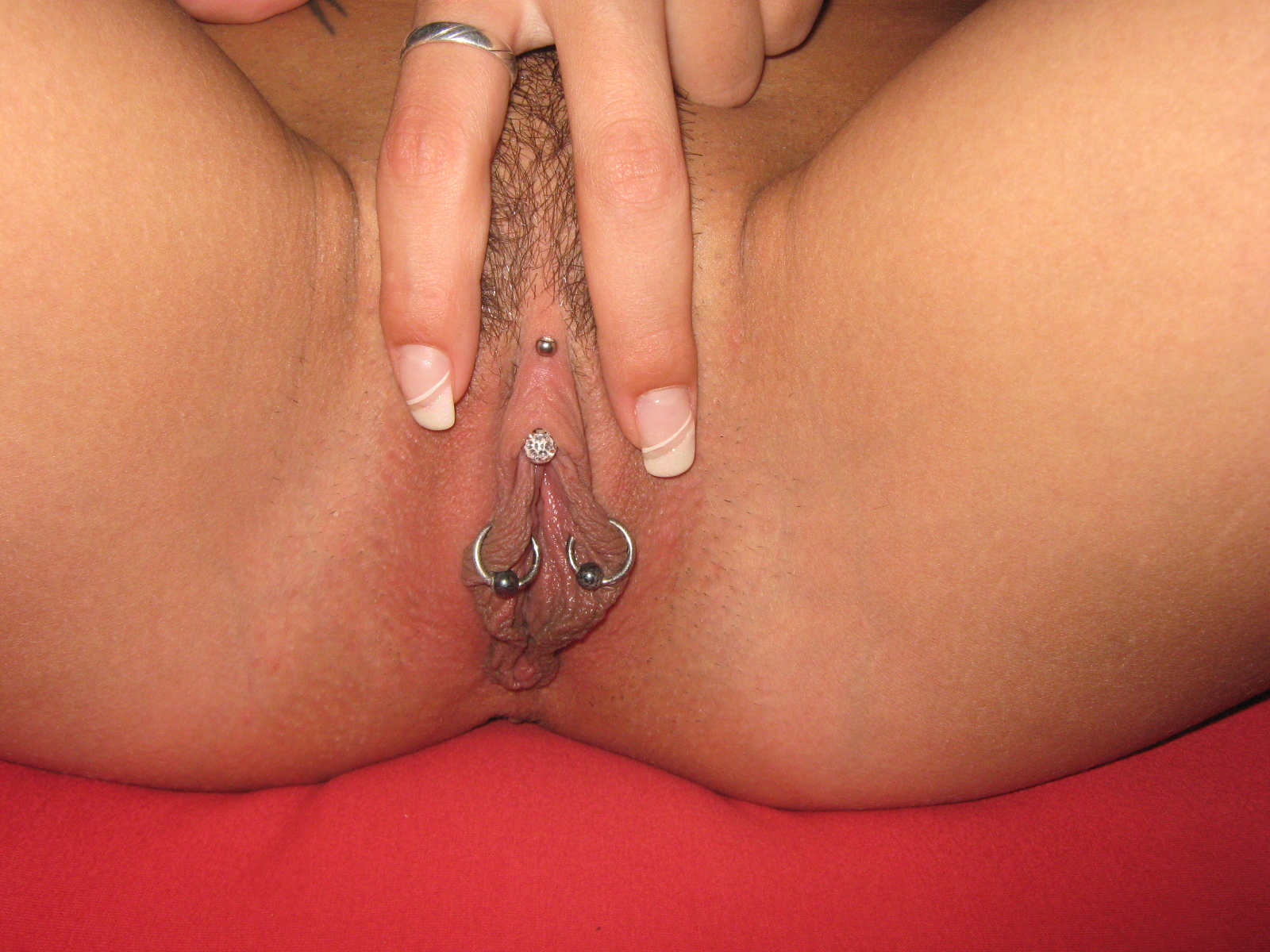 meine prachtstücke!!! ;-)